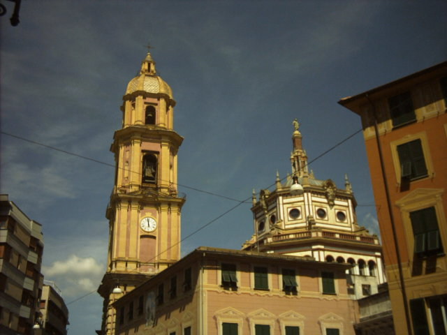 Campanile e cupola della Basilica dei S.S. Gervasio e Protasio, vista da Piazza Cavour